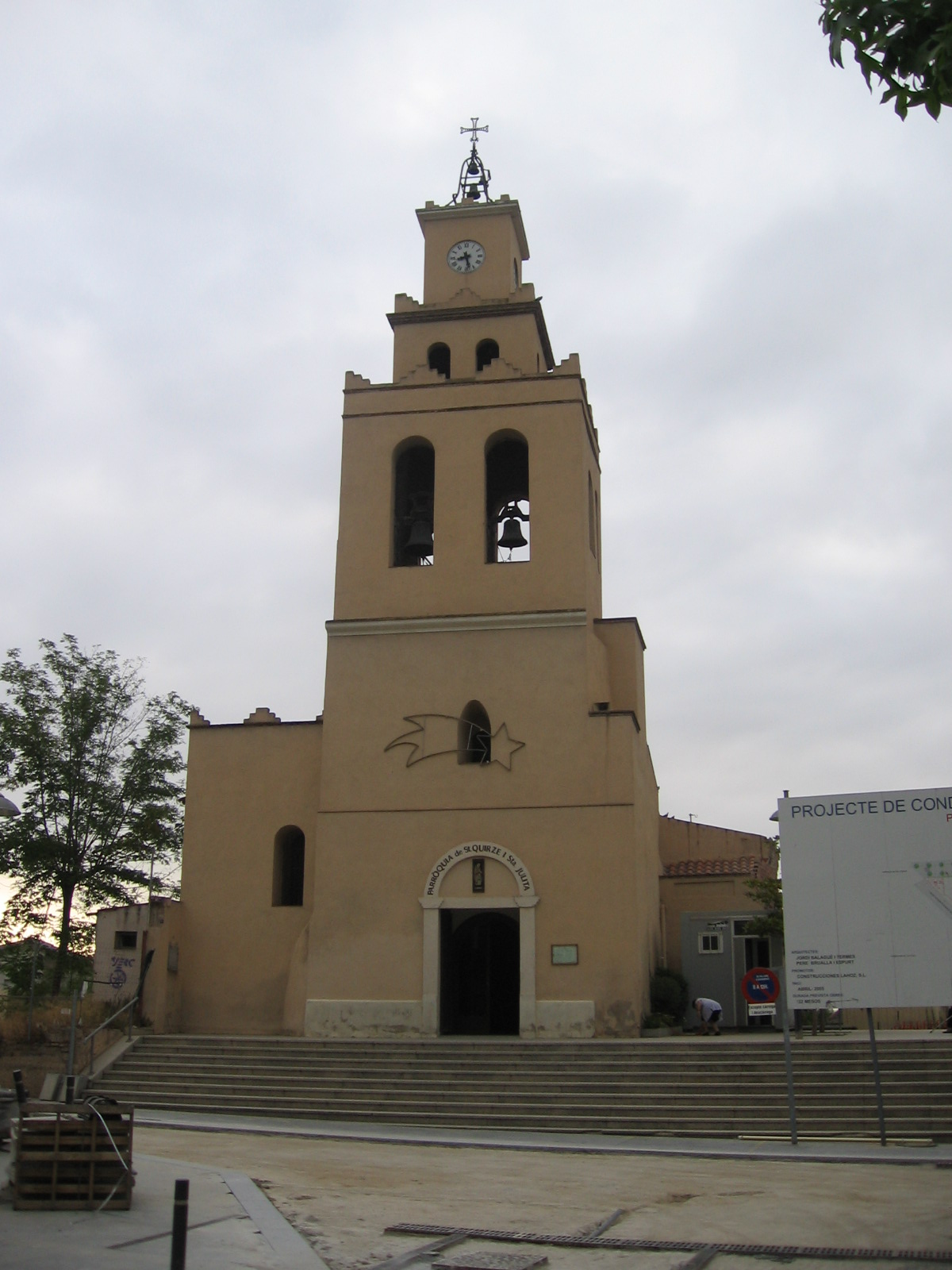 Parroquia, entrada principal.